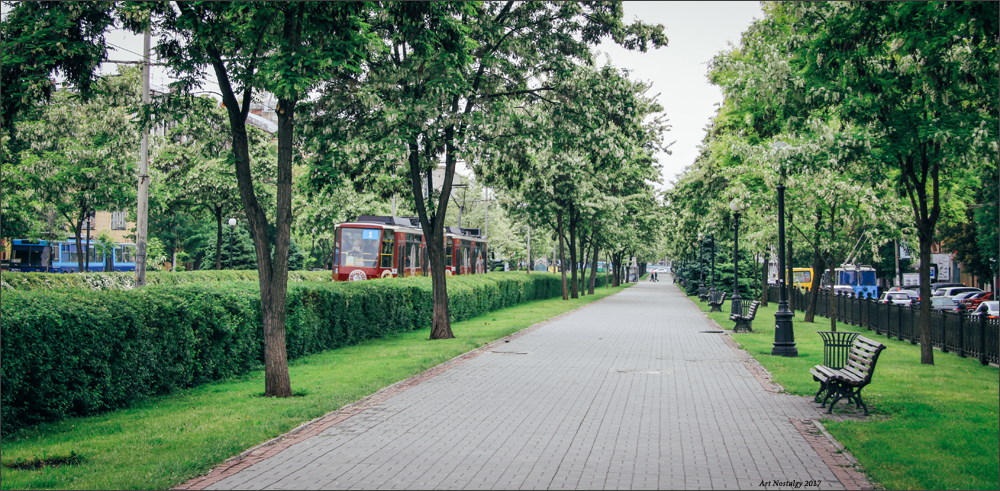 трамвай №1 на проспекті